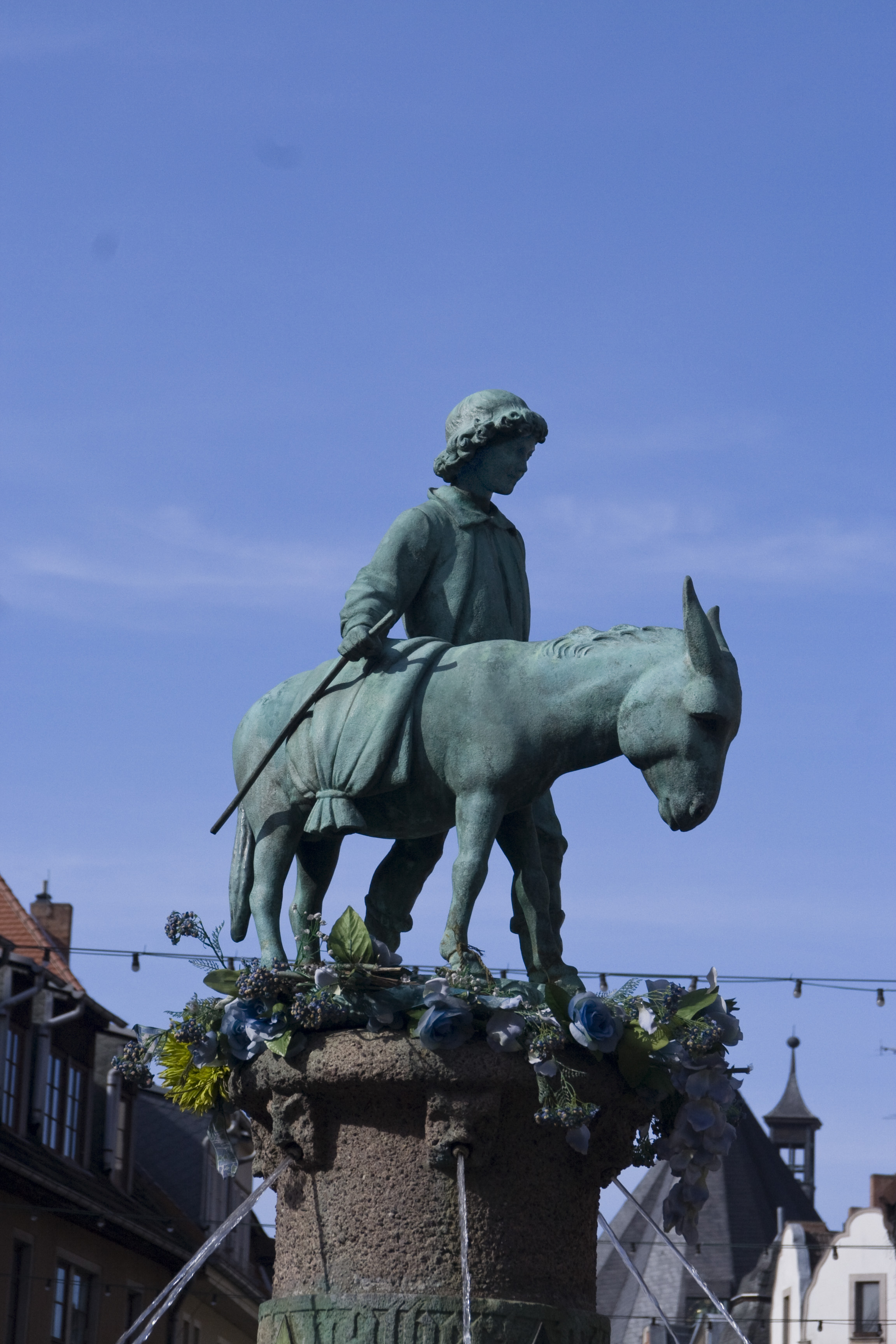 Ansicht der Statuette des Eselsbrunnens in Halle/Saale.